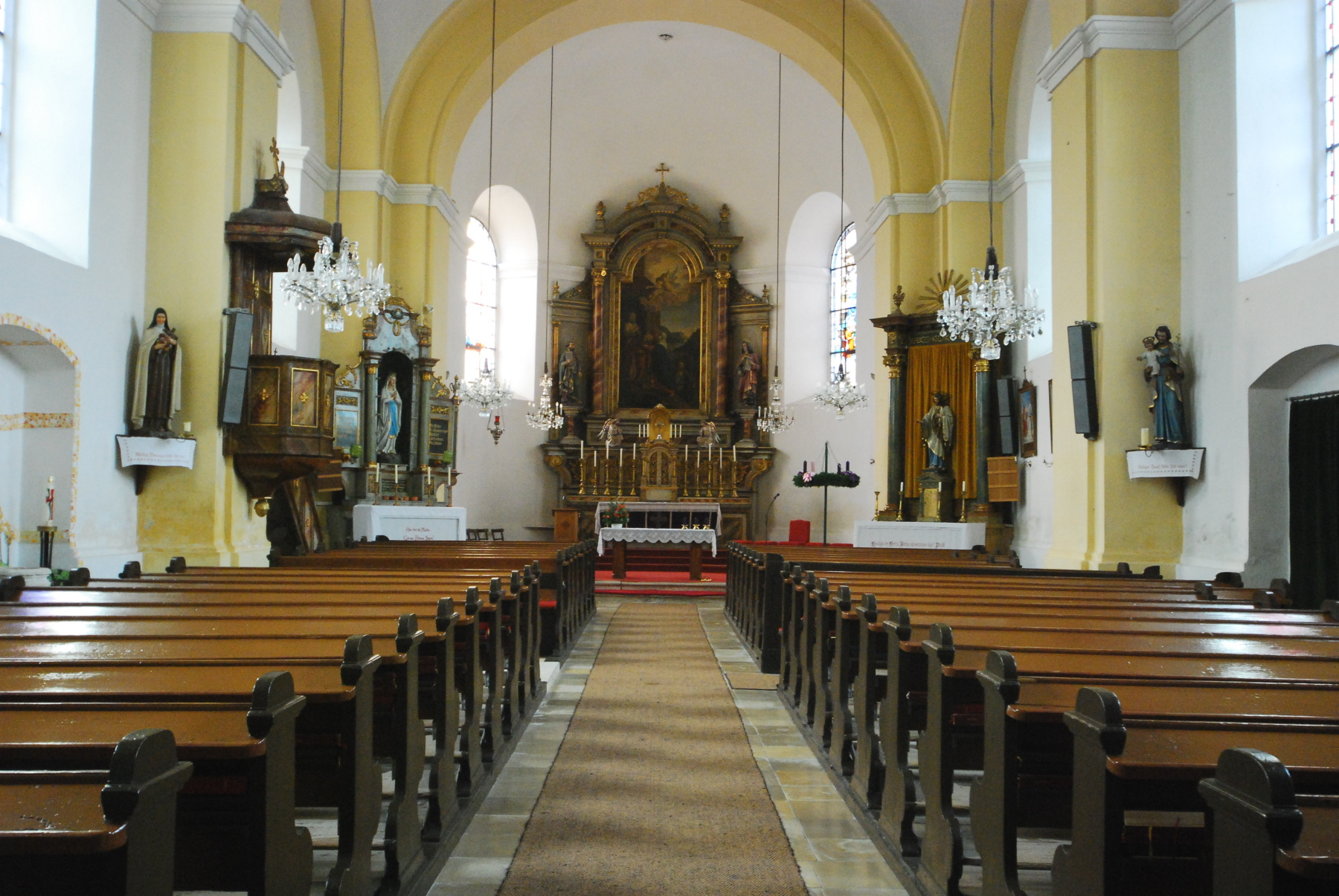 katholische Pfarrkirche Maria Heimsuchung